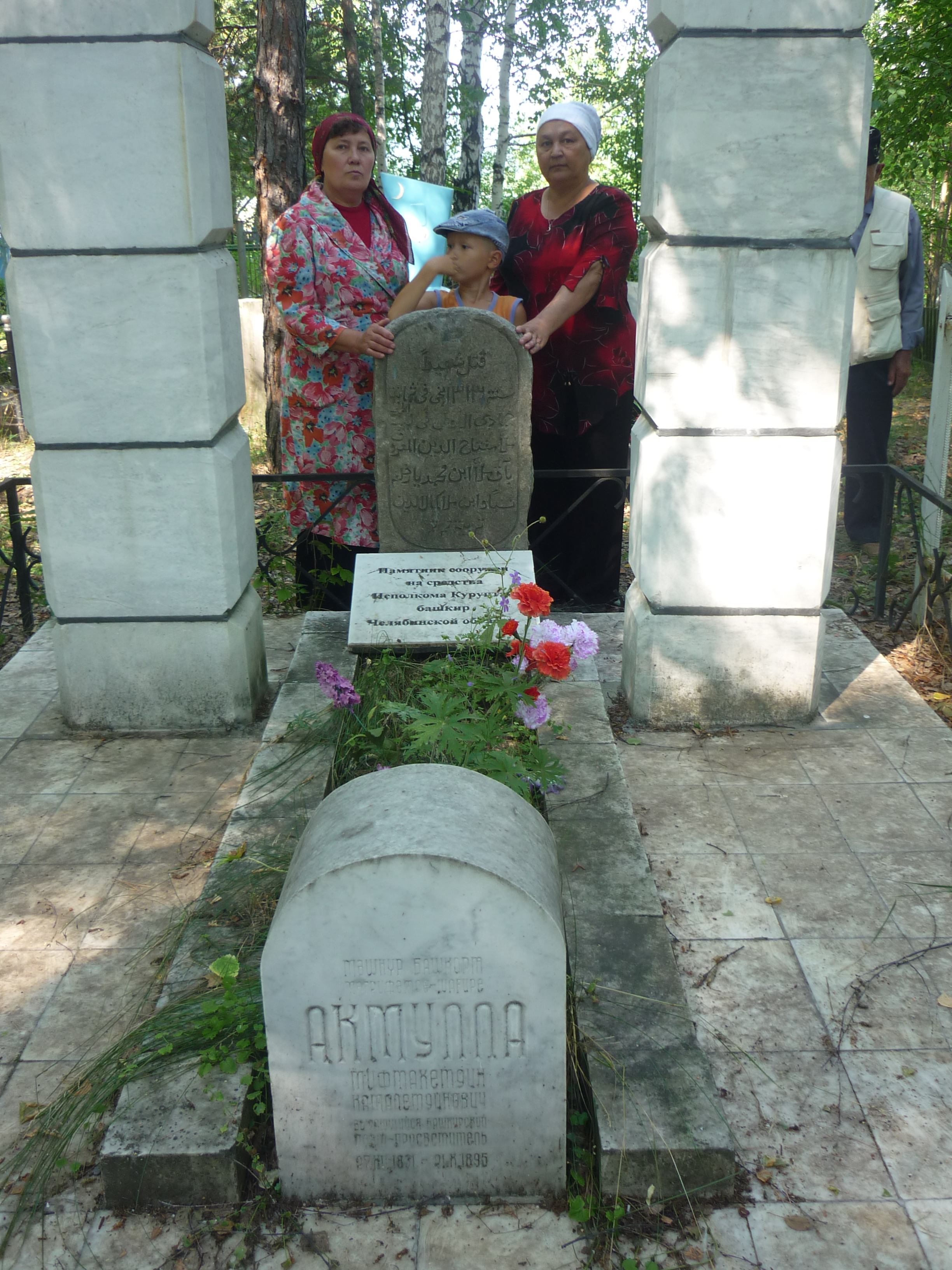 Башҡортса: Силәбе өлкәһе Мейәс ҡалаһындағы зыярат